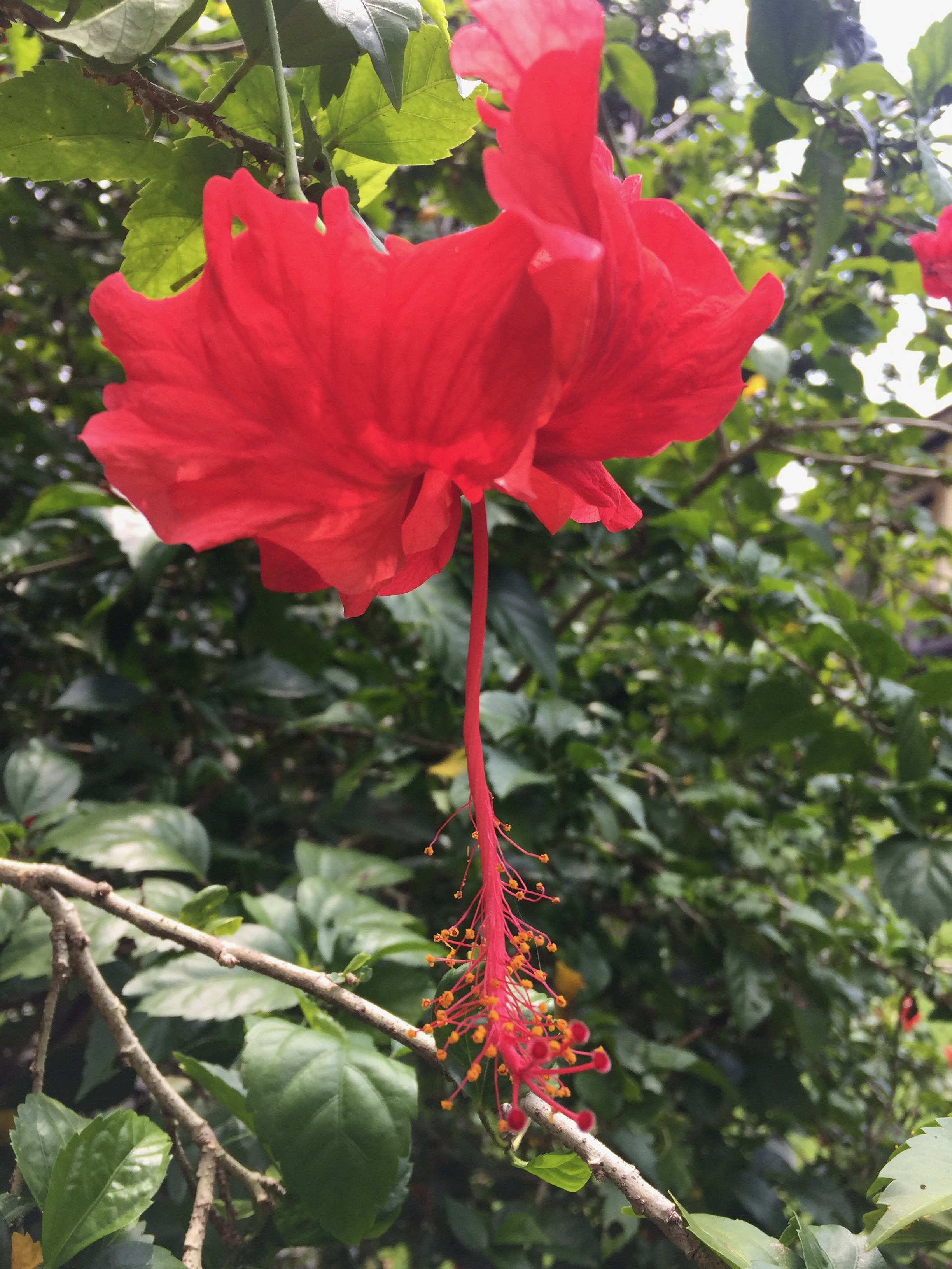 Sebuah bunga kembang sepatu dengan putik menjuntai.